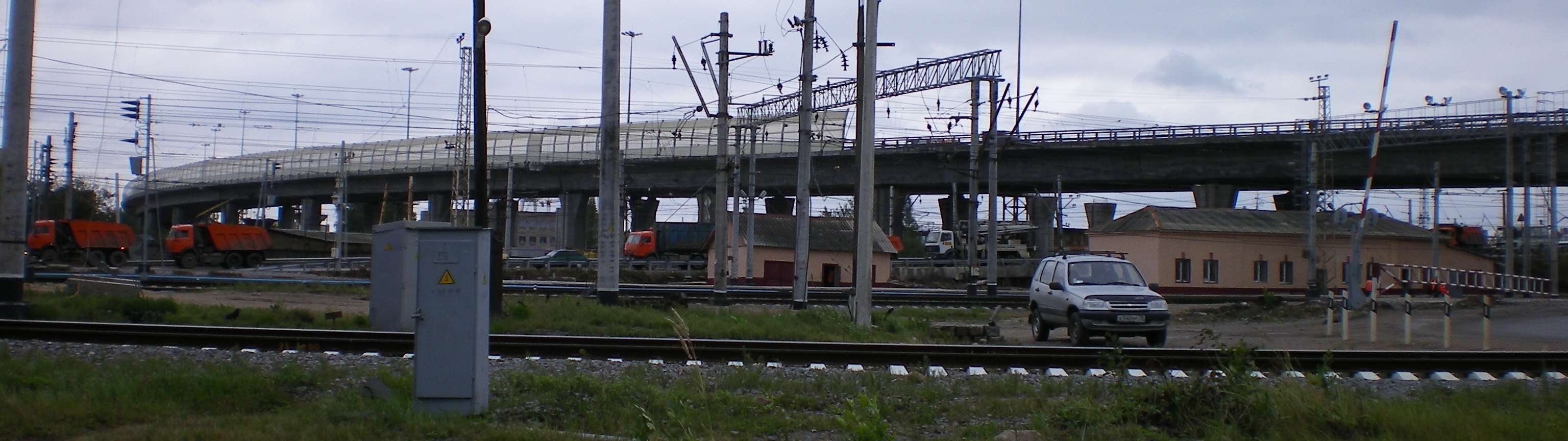 Кольцевая Автодорога, южная эстакада